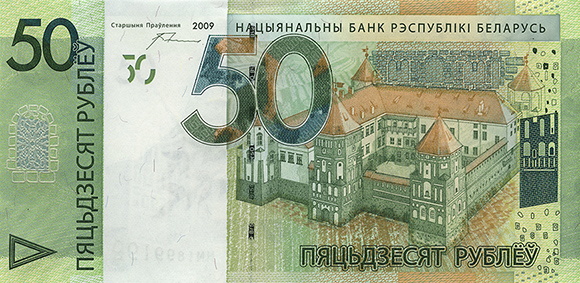 50 белорусских рублей образца 2009 года (лицевая сторона)